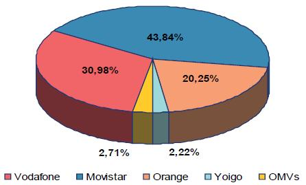 AltaLineasMovilAbril2009.jpg